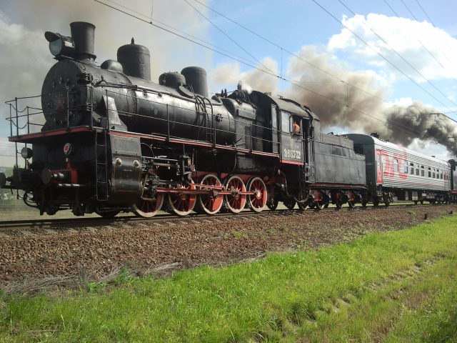 Витебское направление ОЖД